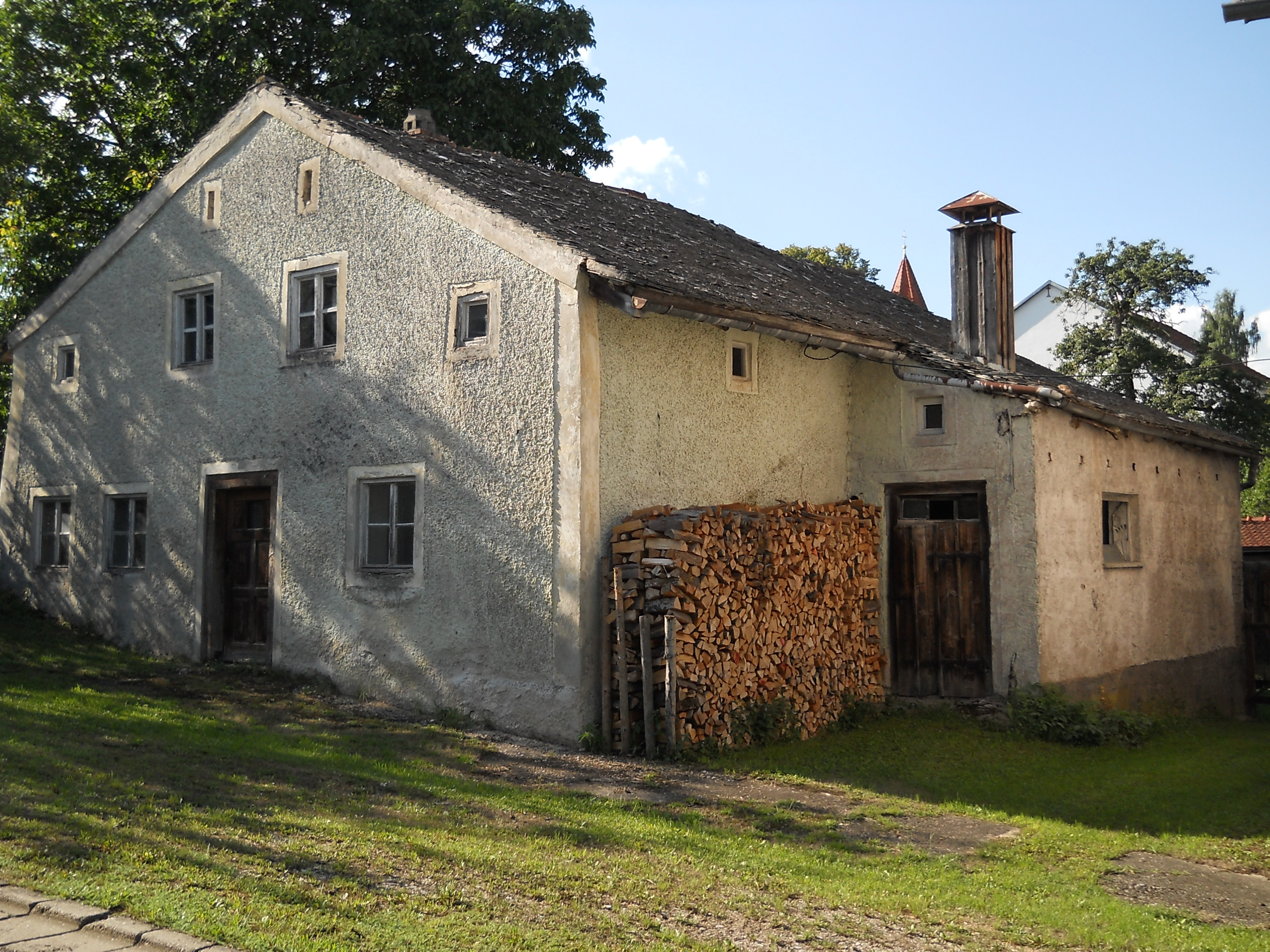 Traditionelles Jura-Haus in Wintershof, Ortsteil von Eichstätt im oberbayerischen Landkreis Eichstätt